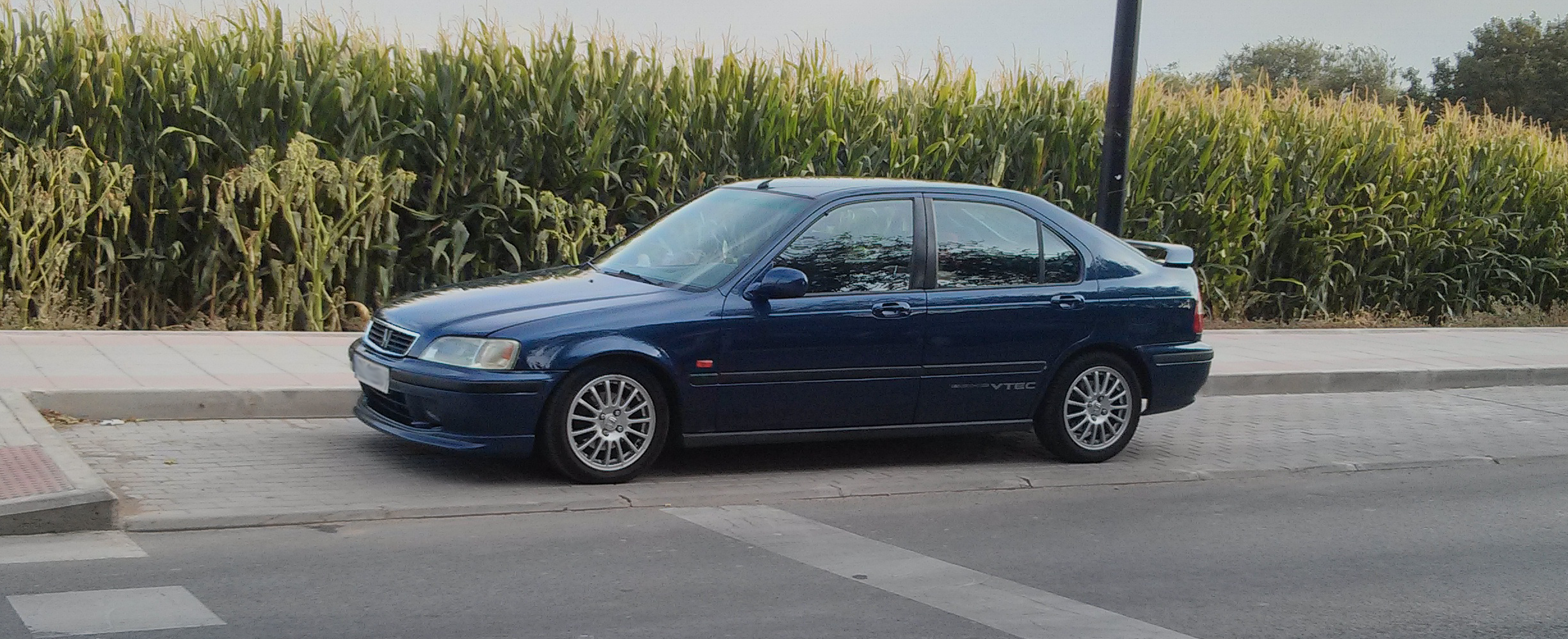 Honda Civic MB4 D16W4 125 HP